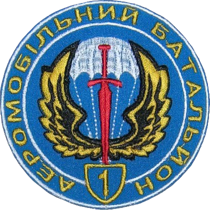 Парадний нарукавний шеврон 1-го батальйону 95-ї окремої аеромобільної бригади